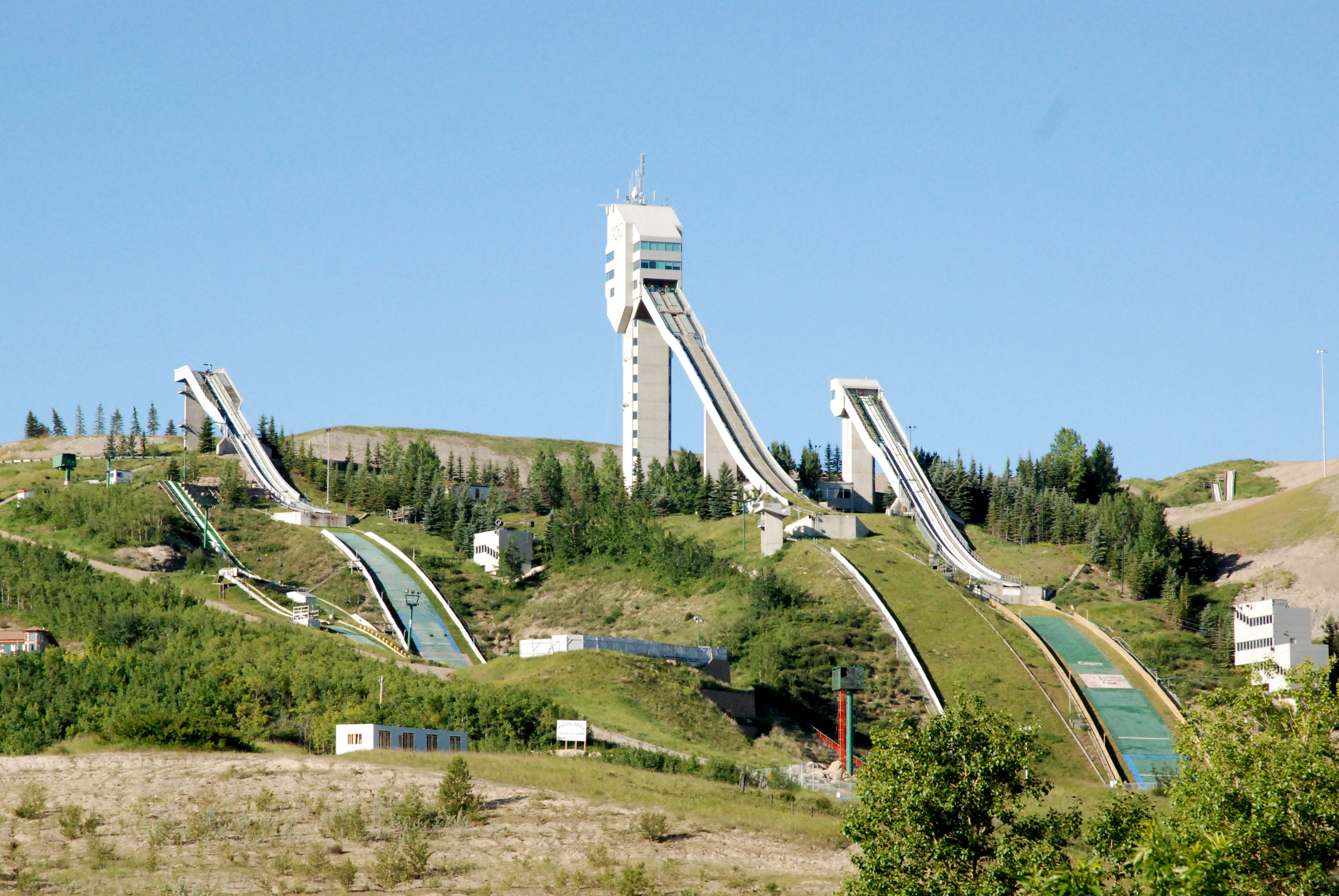 Calgary ski jumps